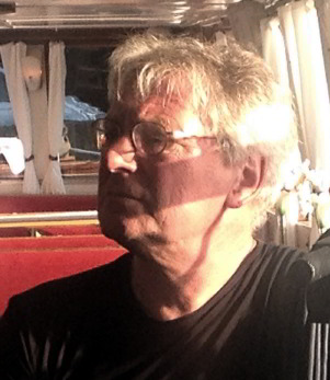 Dirk Maxeiner, Sept. 2015